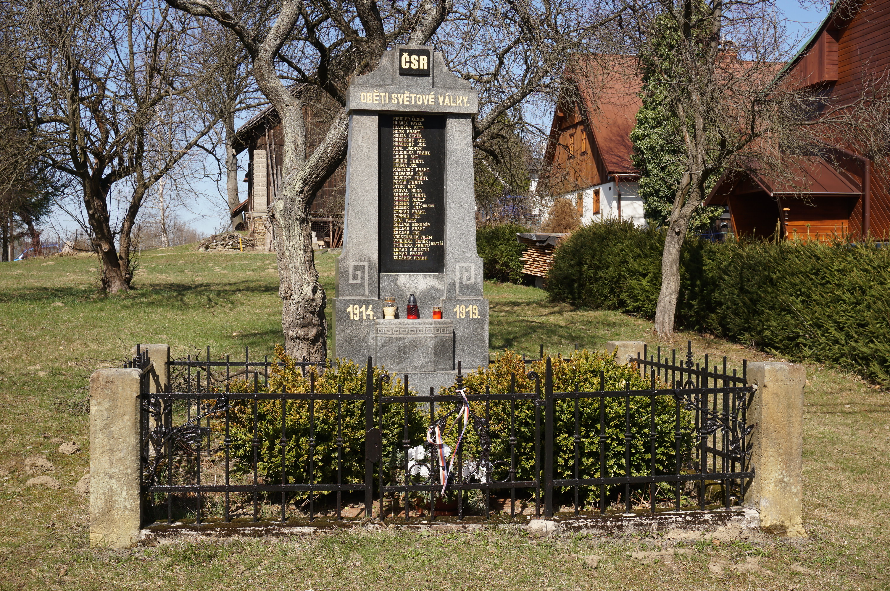 Roztoky u Semil - pomník padlým